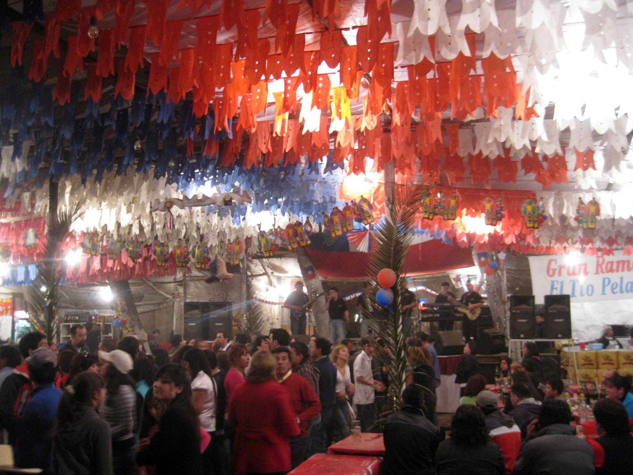 Asistentes a una fonda en Calera de Tango, durante las Fiestas Patrias chilenas.